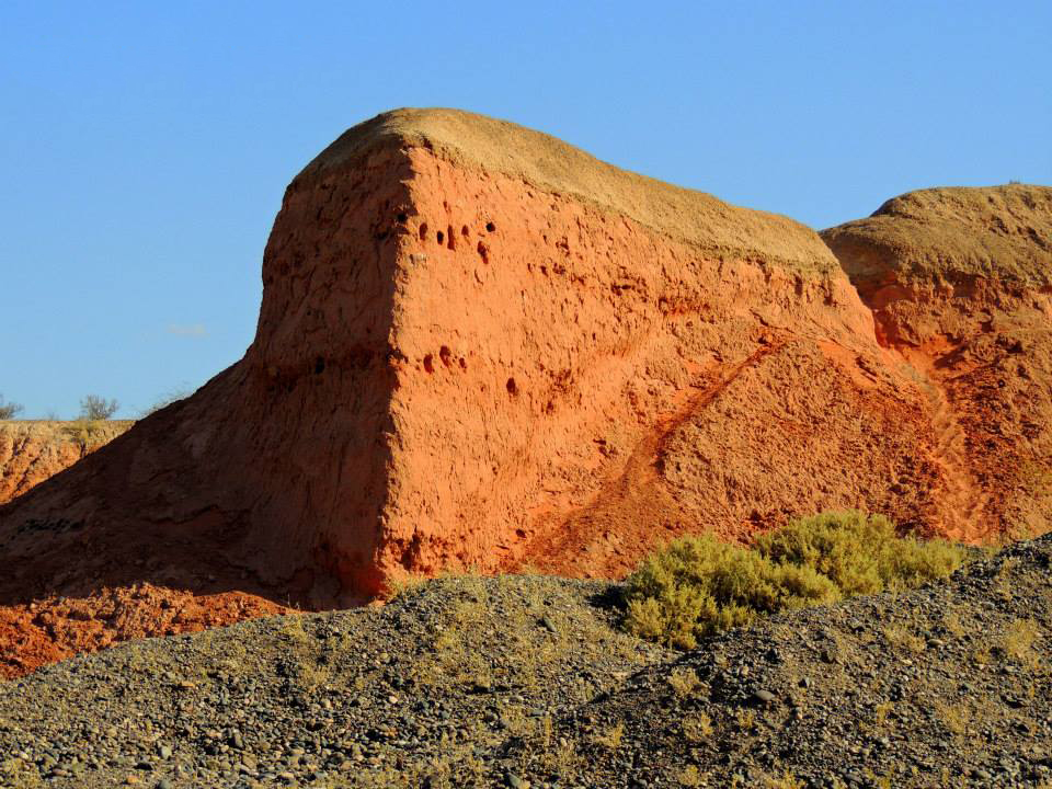 Paisajes vistosos de Paso Córdova, Gral Roca. Foto de Javier Larrea Fotografía